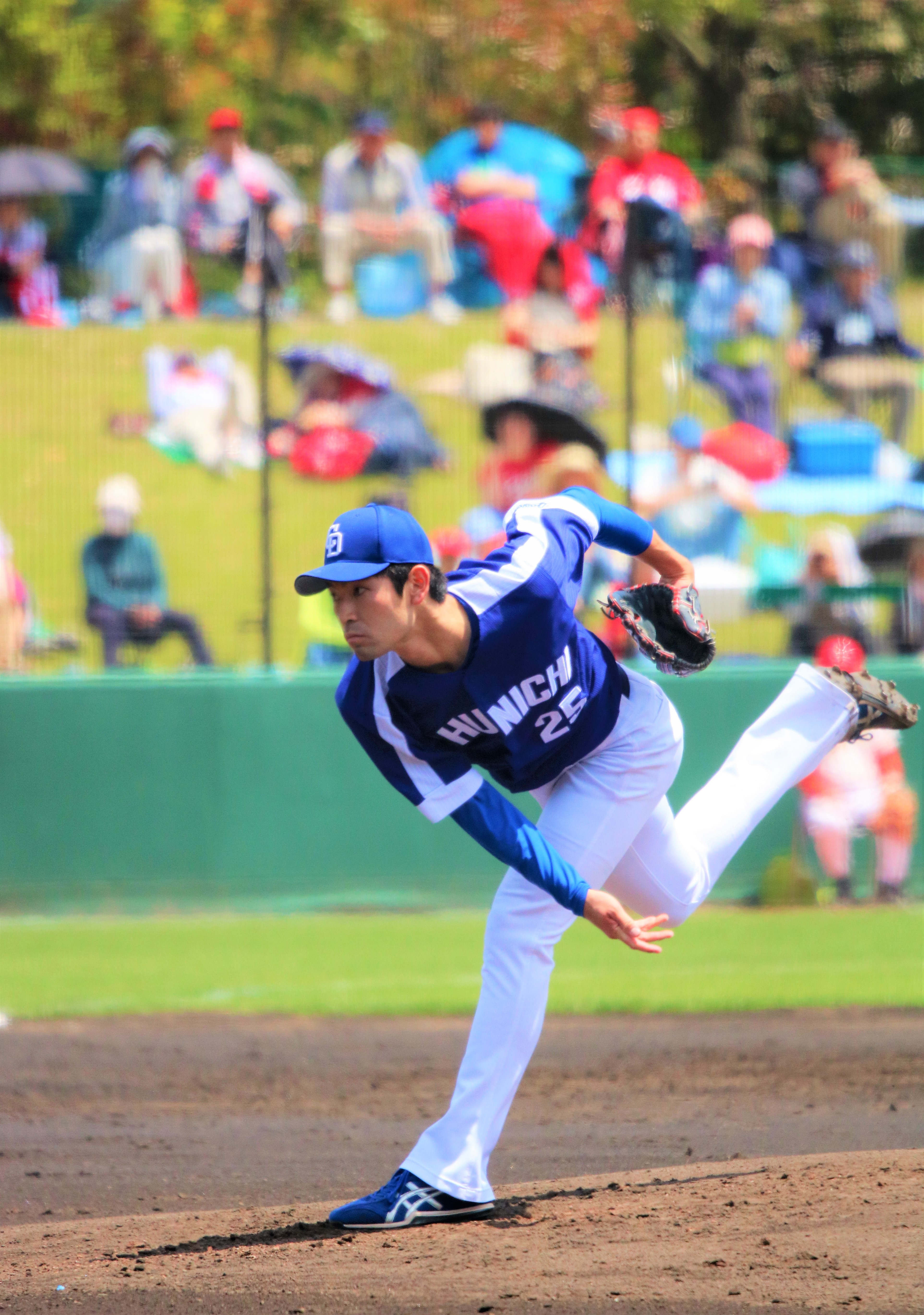 2018/5/10 広島東洋カープ由宇練習場